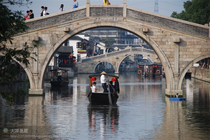 苏州千灯古镇